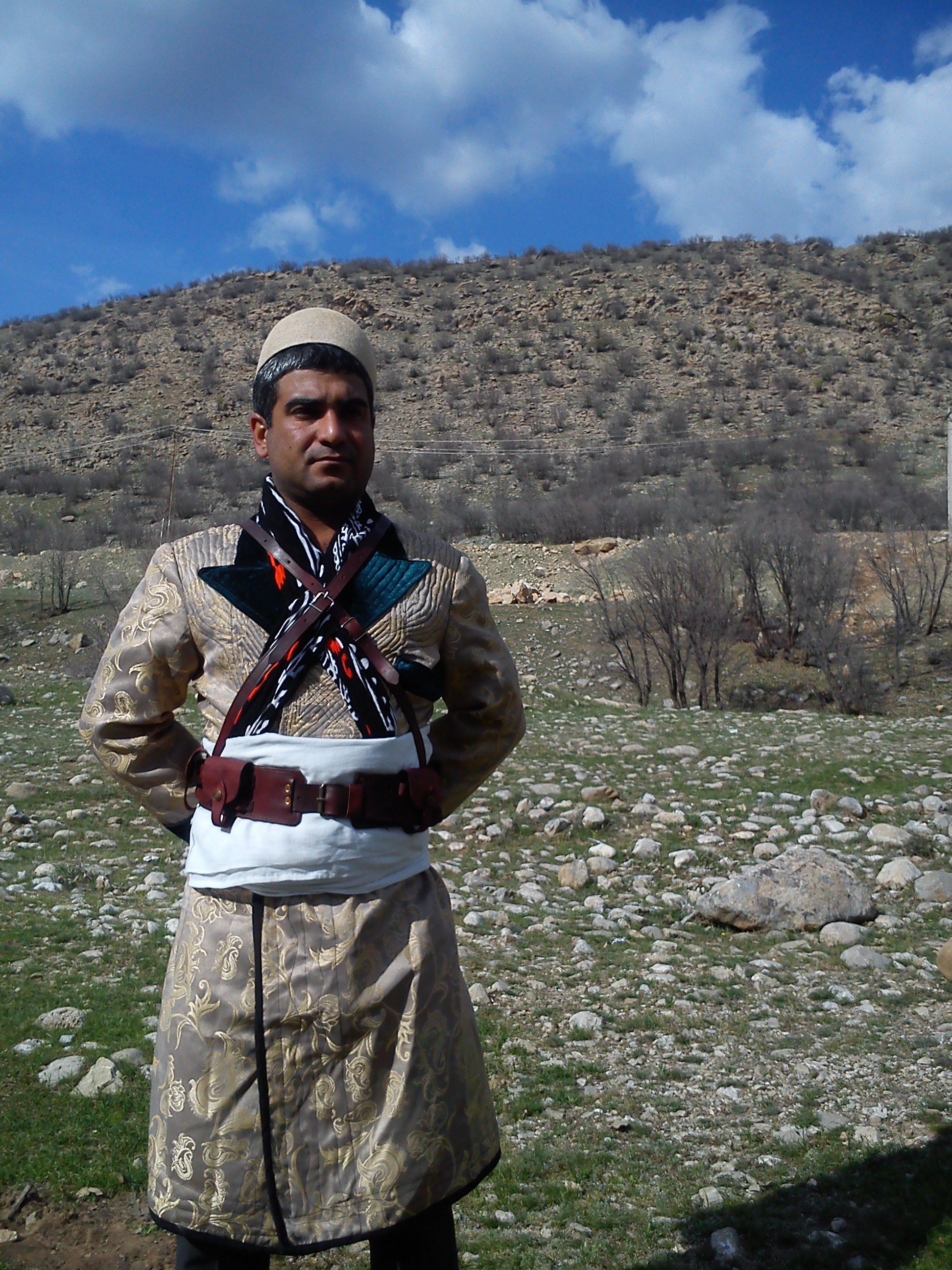 شال و ستره.....لباس لوری